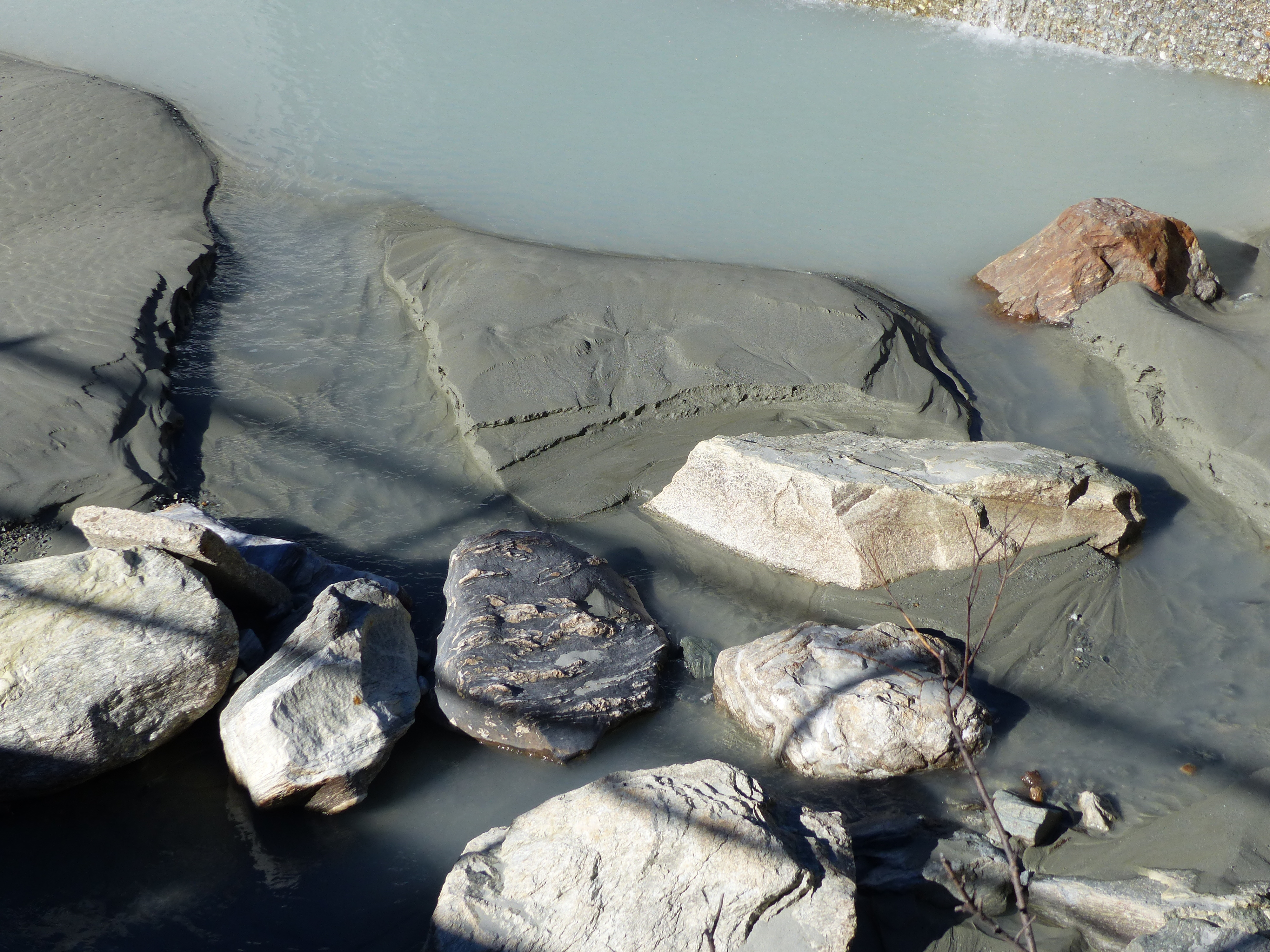 Gletschermilch des Zmuttbaches mit abgelagerter Schwebfracht. Aufgenommen unweit des Arbenfalles.